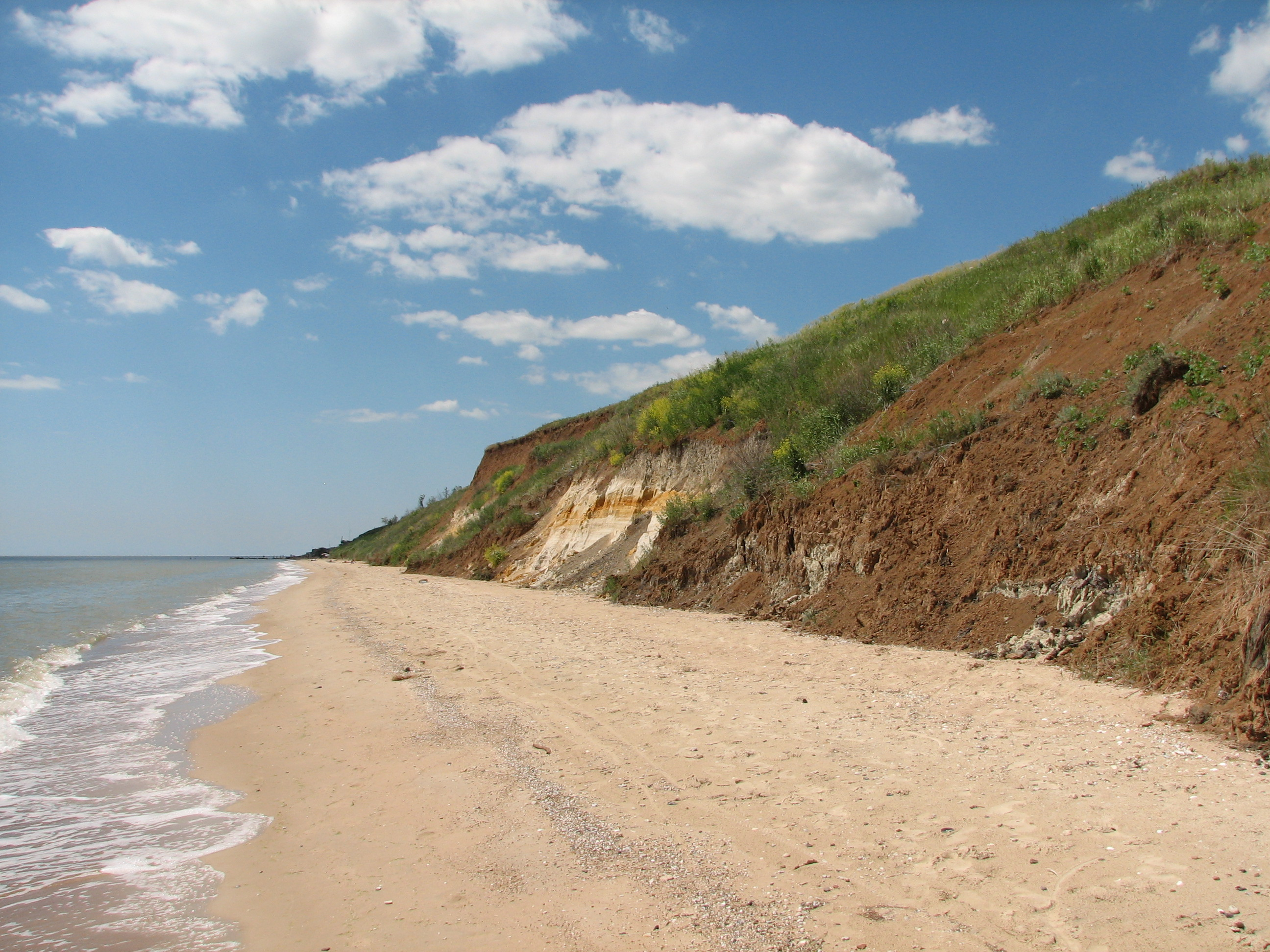 Этот снимок сделан в районе села Рыбацкое на побережье Азовского моря